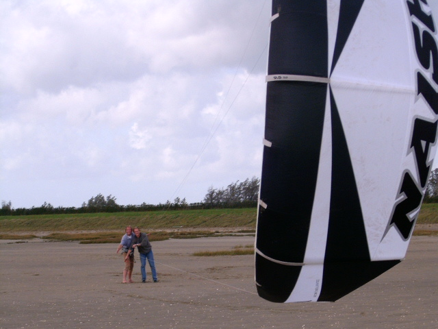 A big Kite